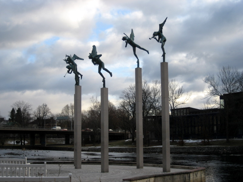 Fem musicerande genier - sculpteur Carl Milles (1949)